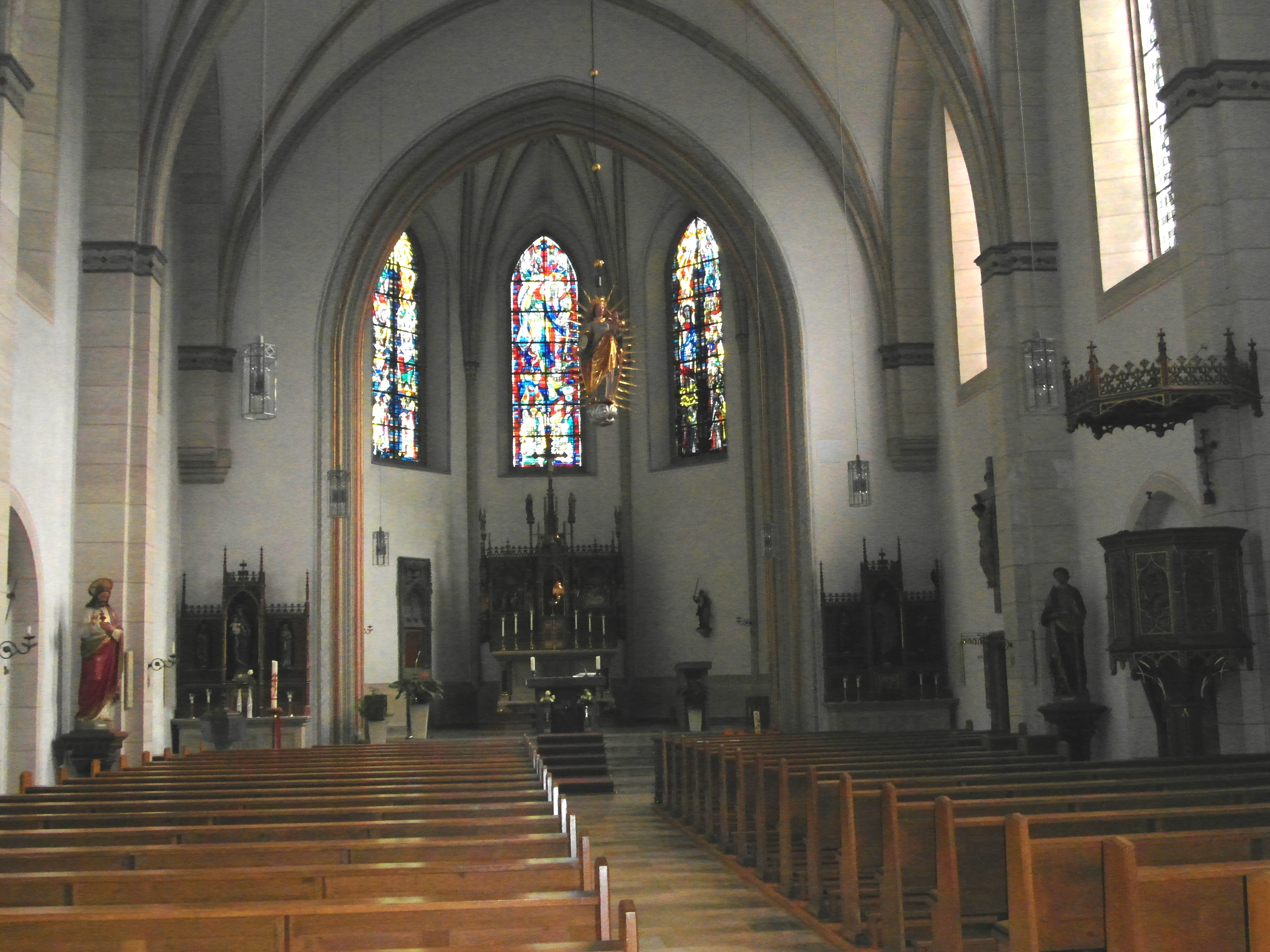 Innenansicht der Pfarrkirche St. Pankratius in Eslohe Reiste